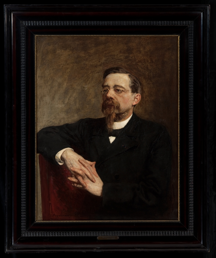 Portret van Prof. J.M.Telders door H.J. Haverman (1857-1928)